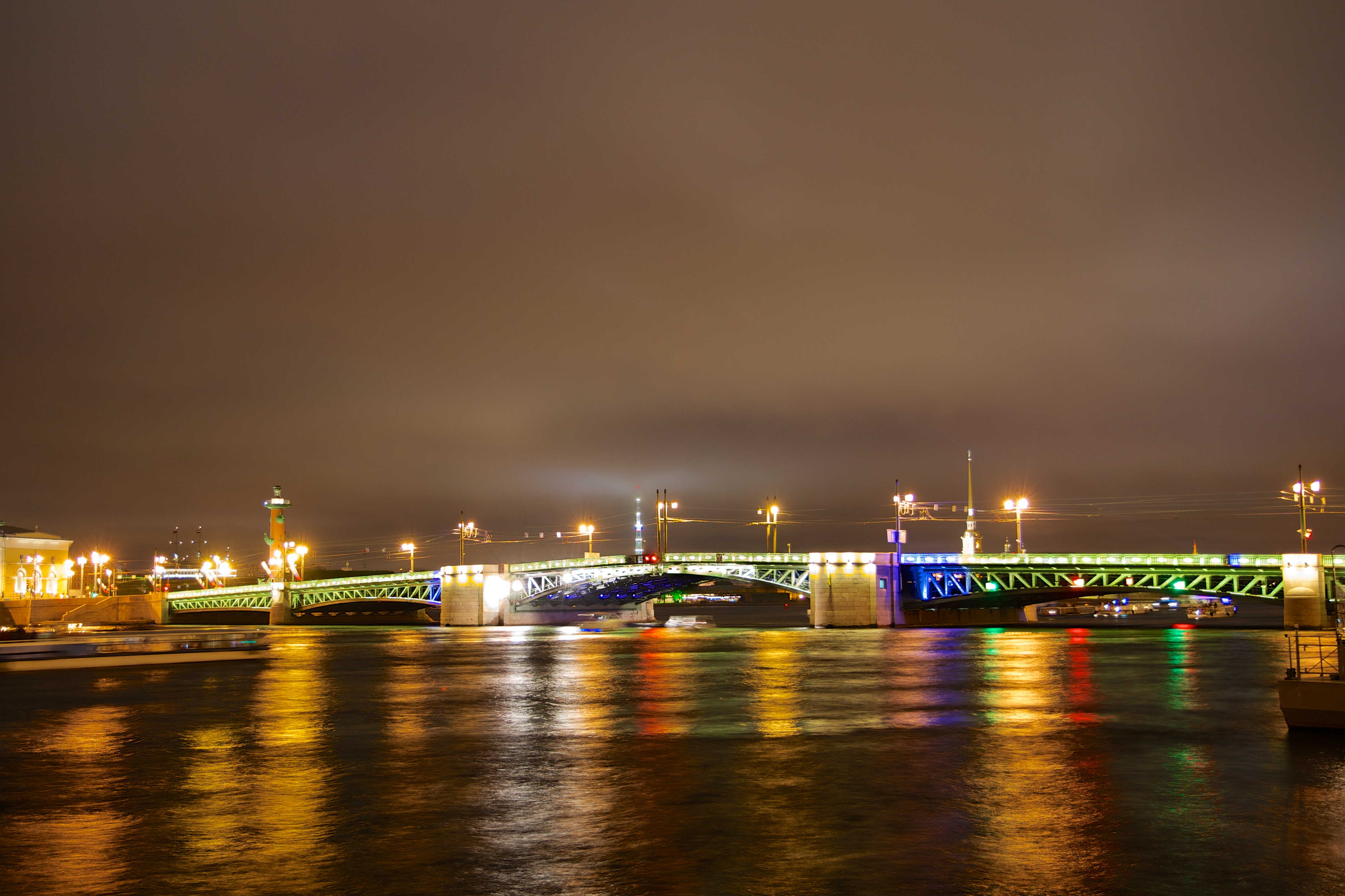 Schlossbrücke (Дворцовый мост), Sankt Petersburg Kurz vor der Öffnung um 01:31 Uhr.